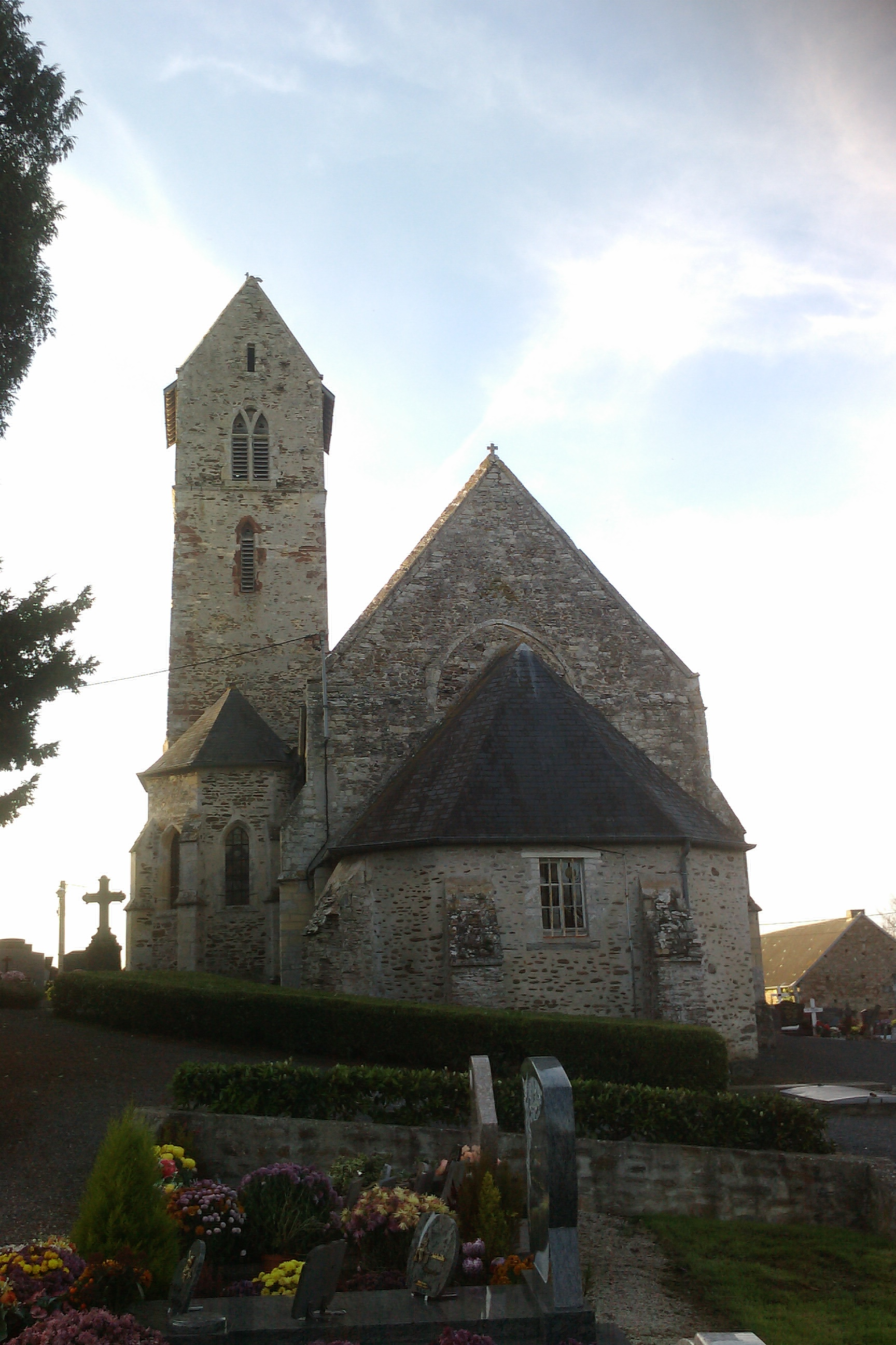 église Notre-Dame (XVIIe) de Moon-sur-Elle